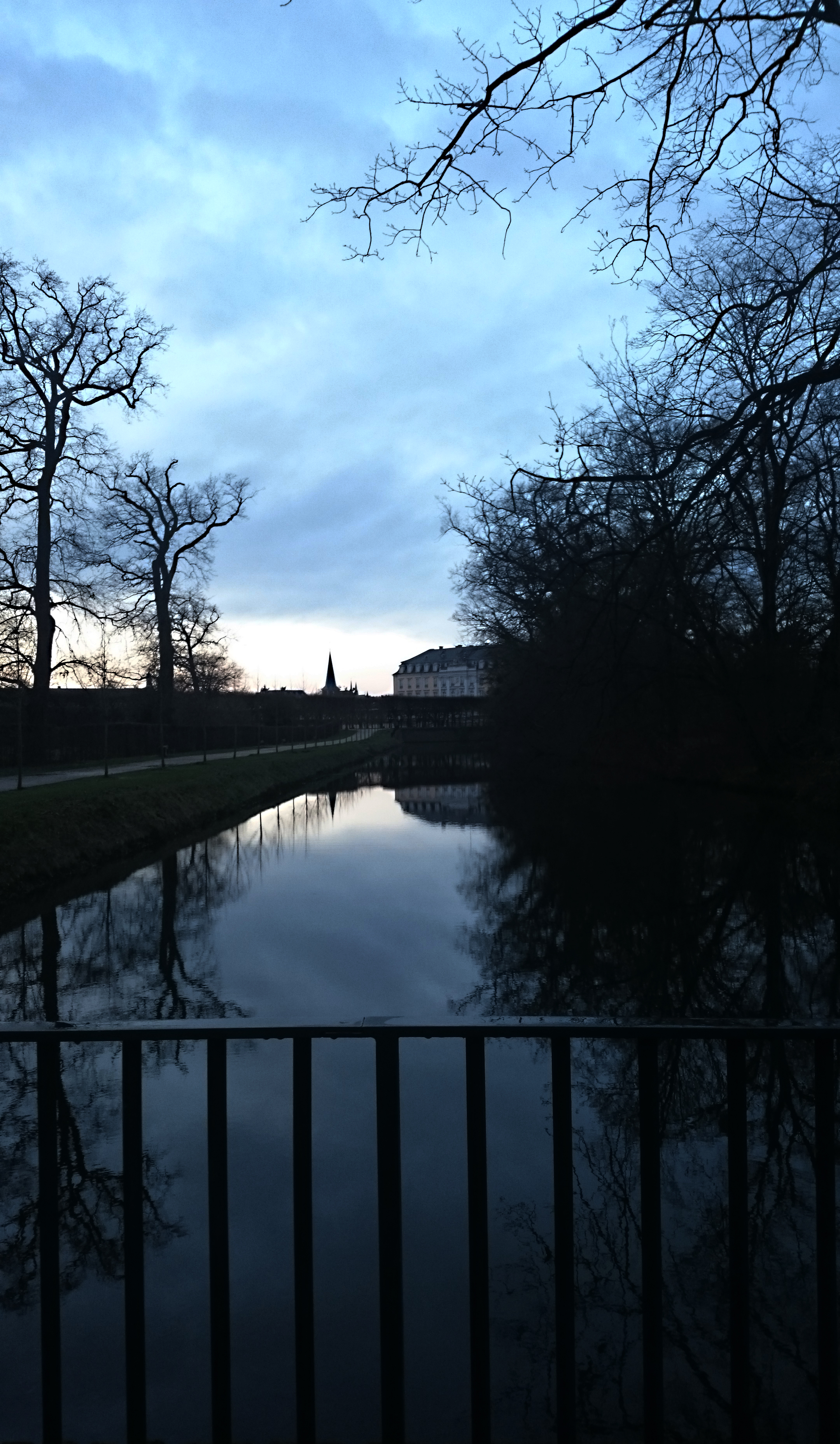 Schloss Augustusburg vom Garten aus